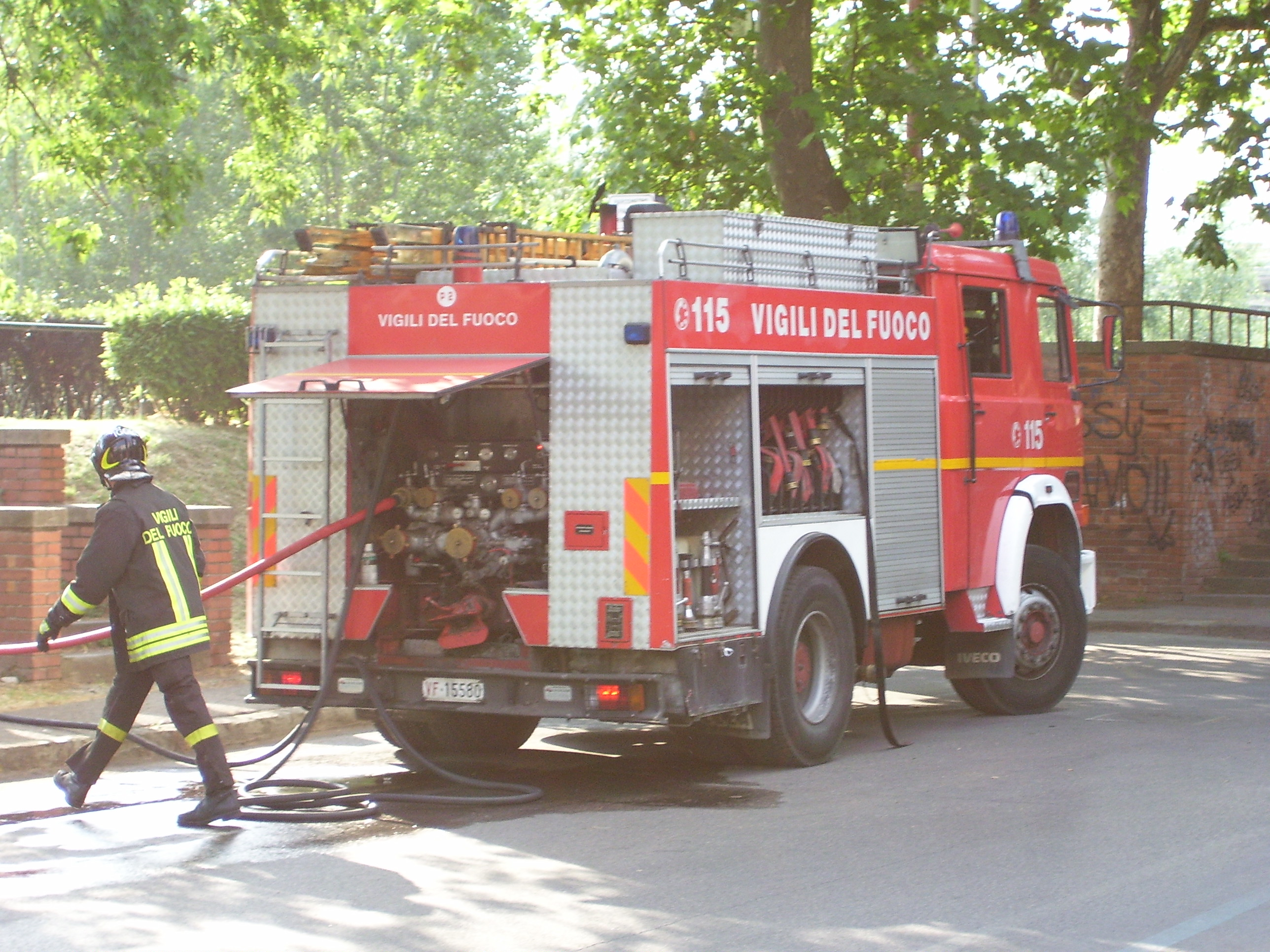 Vigili del Fuoco - Autopompa Iveco Baribbi 190-26.